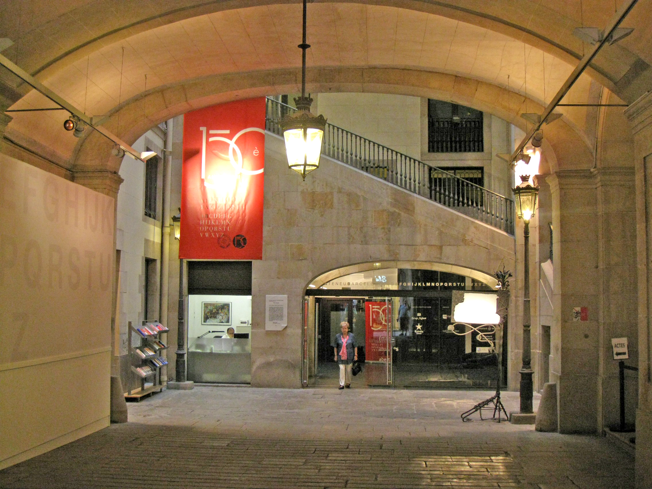 El palau Savassona, de 1796, seu de l'Ateneu Barcelonès des del 1906. Vista del pati d'entrada.